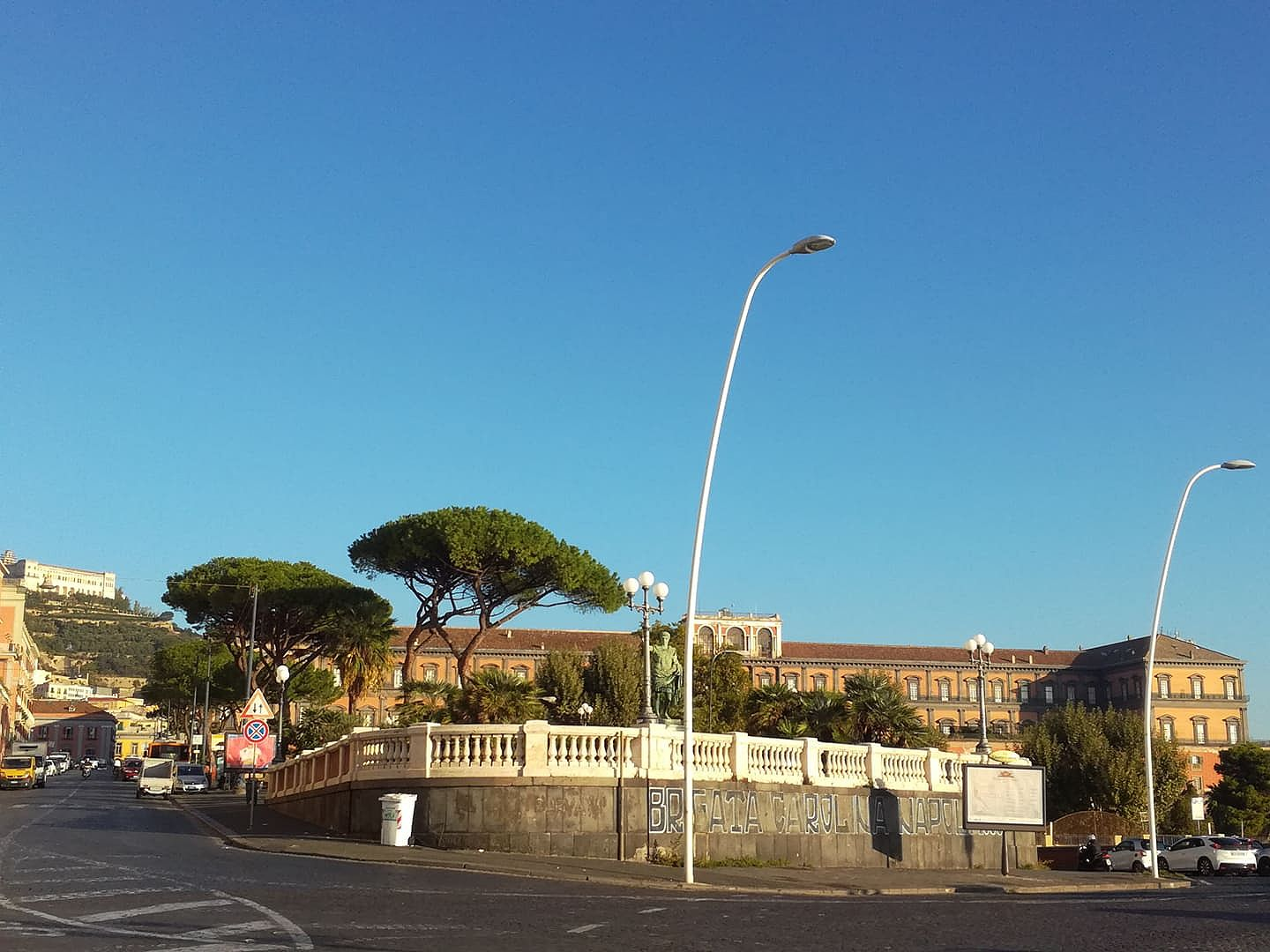 via Cesario Console